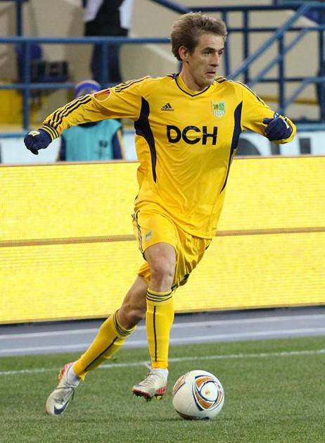 Marko Dević playing for FC Metalist Kharkiv against Malmö FF